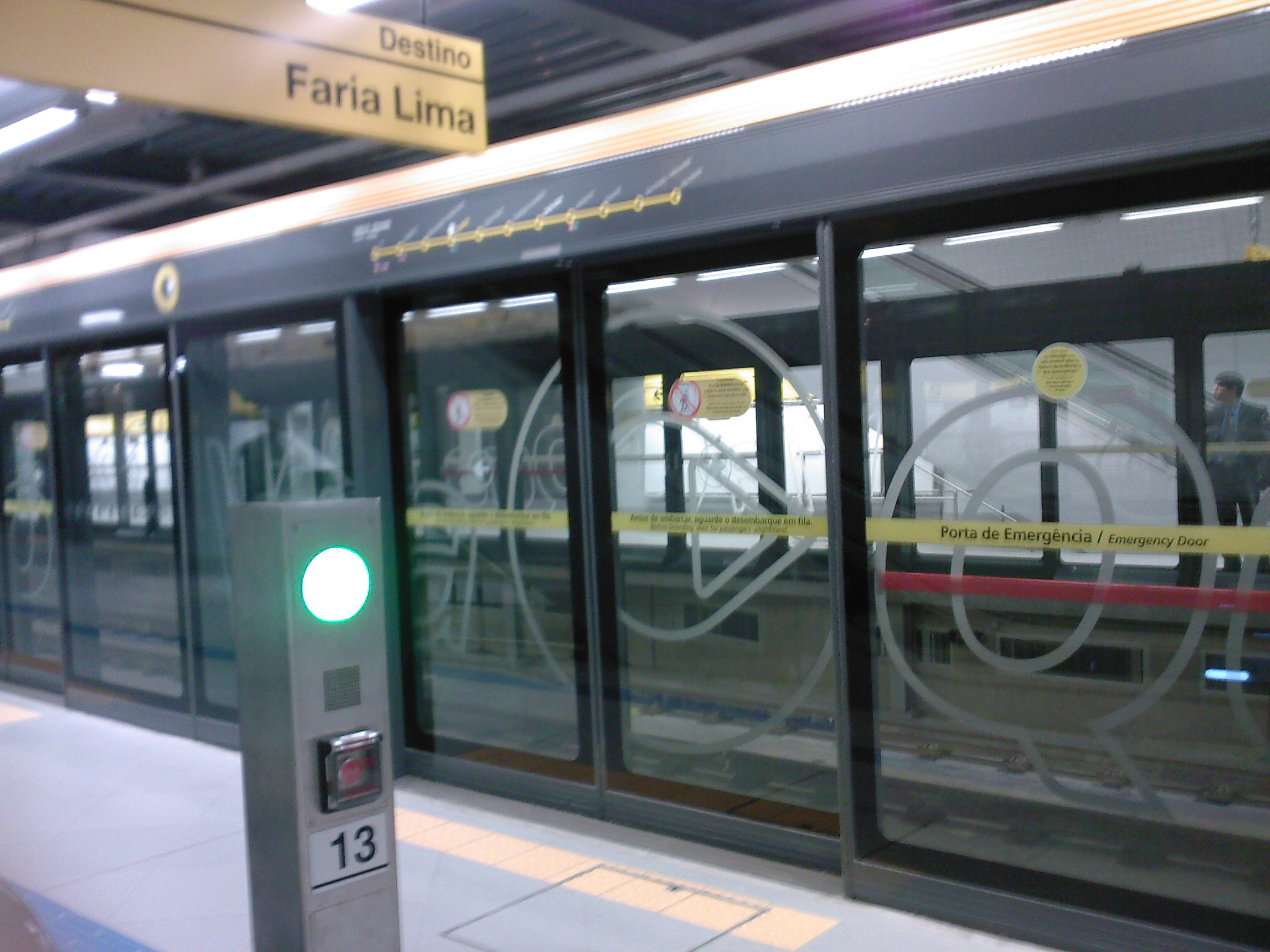 Portas de Pltaforma na Estação Paulista da Linha Amarela do metrô de SP.